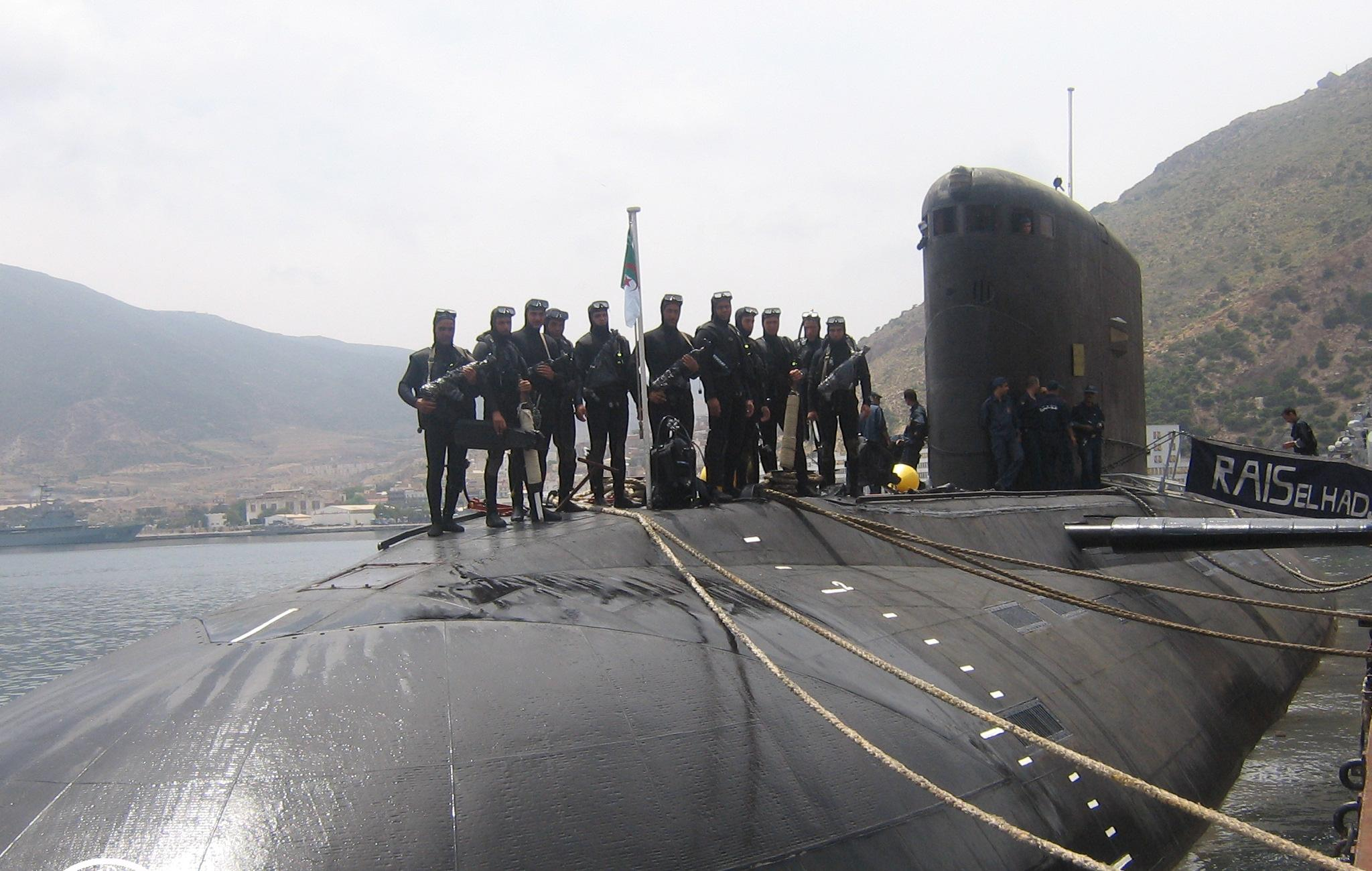 Unité spéciale des nageurs de combat au-dessus du sous-marin Raïs El Hadj Moubarek (013) des Forces navales algériennes.